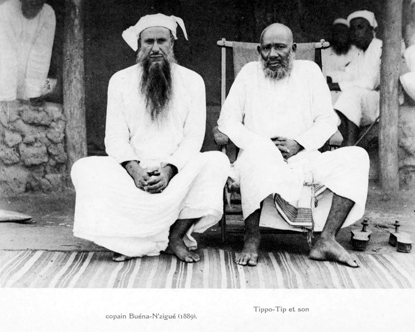 Tippo-Tip (à droite) et son copain Buéna-N’zigué (1889) - p. 300